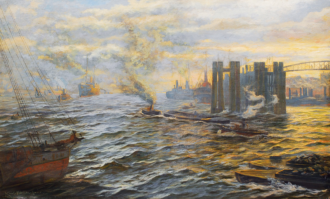 Hamburger Hafen (mit einer Brücke), Öl auf Leinwand, 84 x 135 cm